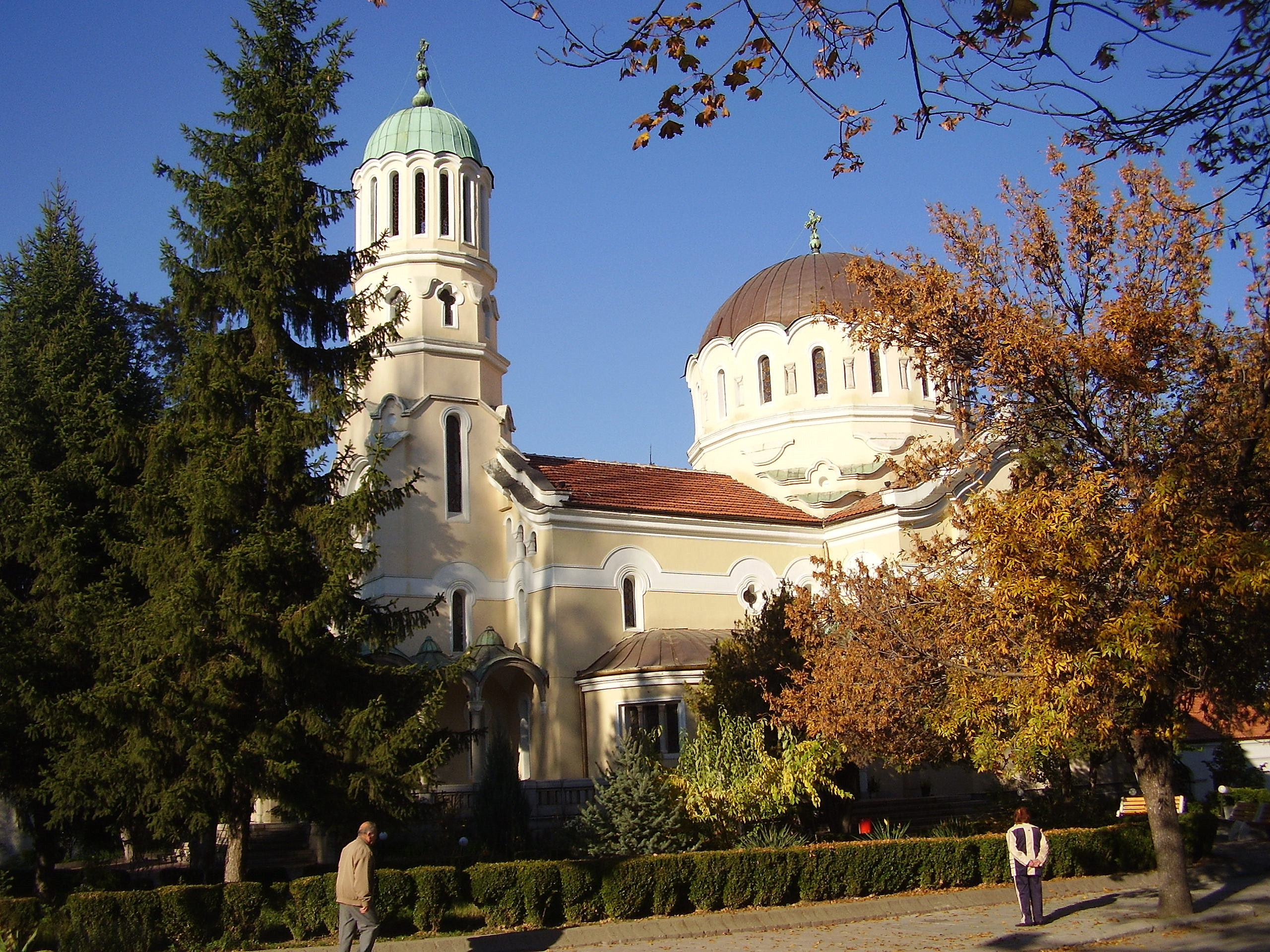 Църквата "Свети Великомъченик Мина" - гр.Кюстендил